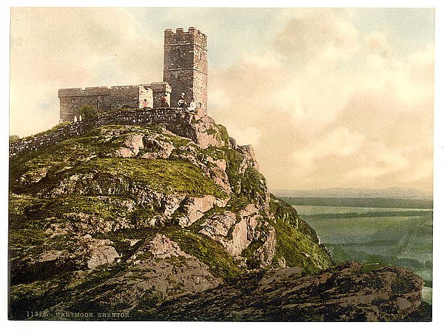 Dartmoor Brentor (Kongressbibliothek) TITLE: [Brentor, Dartmoor, England] CALL NUMBER: LOT 13415, no. 287 [item] [P&P] Find any corresponding online LOT(group) record REPRODUCTION NUMBER: LC-DIG-ppmsc-08265 (digital file from original) No known restrictions on publication. MEDIUM: 1 photomechanical print : photochrom, color. CREATED/PUBLISHED: [between ca. 1890 and ca. 1900]. NOTES: Title from the Detroit Publishing Co., Catalogue J--foreign section, Detroit, Mich. : Detroit Publishing Company, 1905. Print no. "11316". Forms part of: Views of England in the Photochrom print collection. FORMAT: Photochrom prints Color 1890-1900. PART OF: Views of England REPOSITORY: Library of Congress Prints and Photographs Division Washington, D.C. 20540 USA DIGITAL ID: (original) ppmsc 08265 CARD #: 2002696635